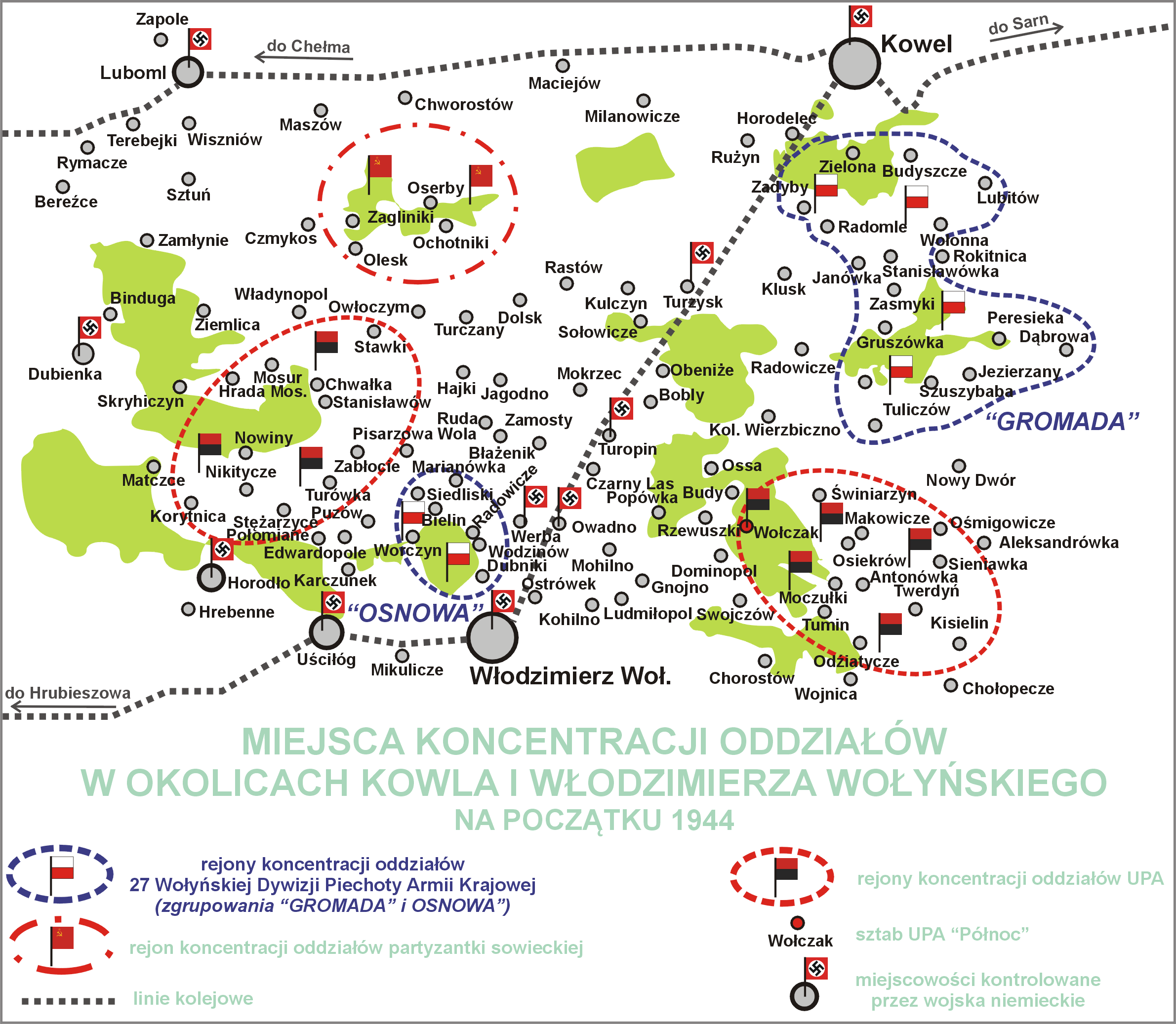 Miejsca koncentracji oddziałów w rejonie Kowla i Włodzimierza Wołyńskiego na początku 1944